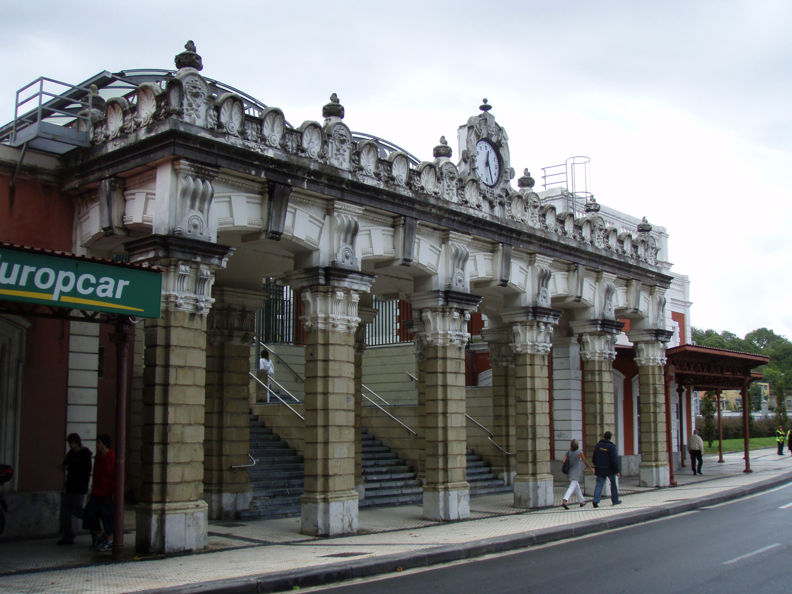 Fachada principal de la estación de San Sebastián